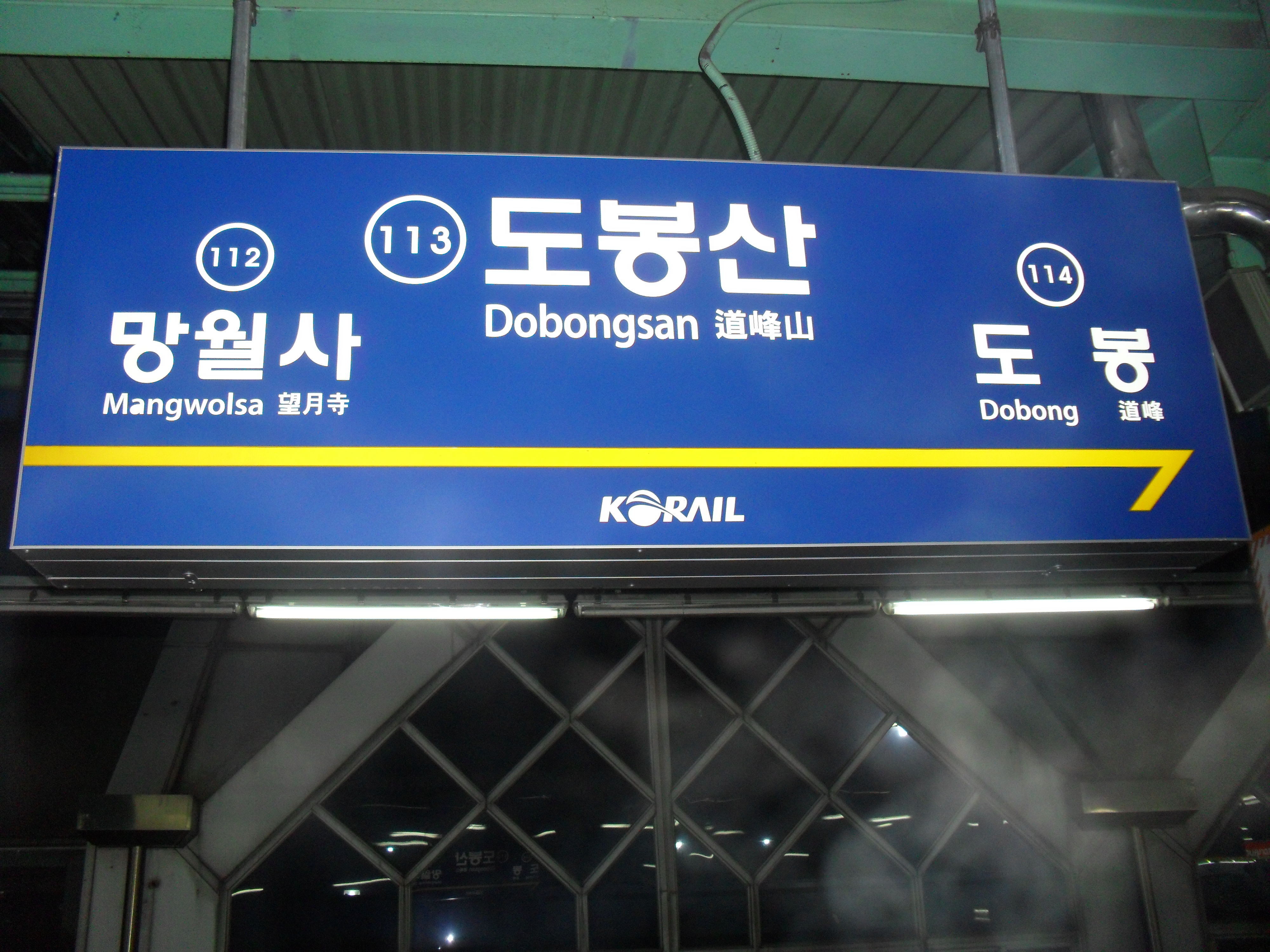 113 도봉산